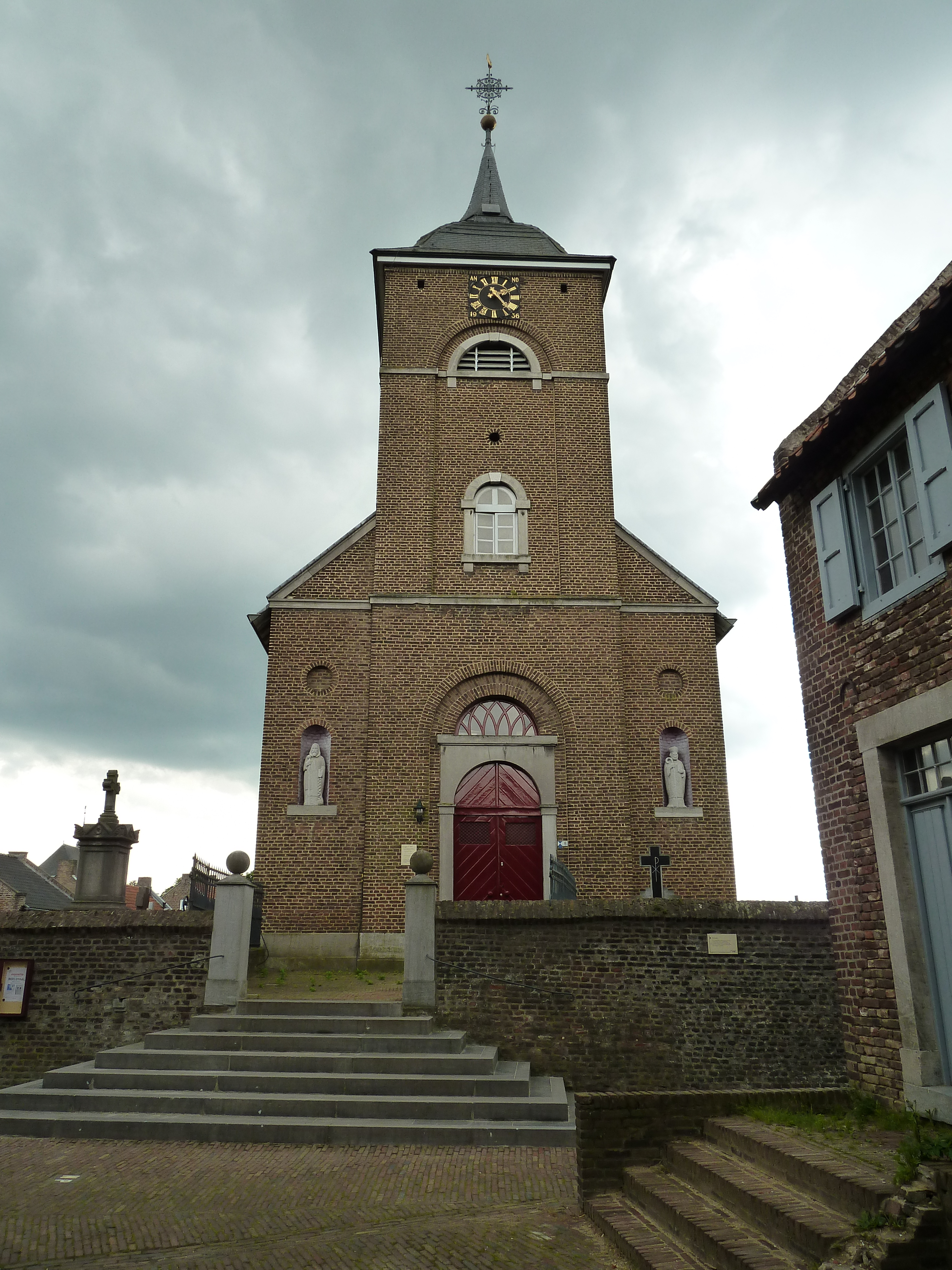 Terpkerk van Urmond, Stein, Limburg, Nederland